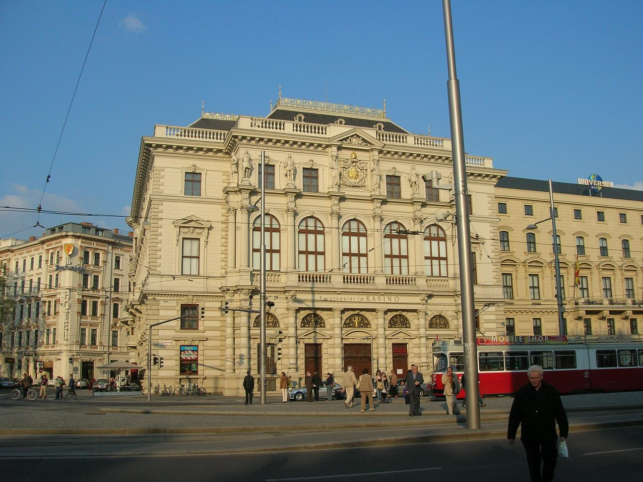 Das Palais Erzherzog Ludwig Viktor, beherbergt heute das Kasino Burgtheater, Schwarzenbergplatz. Erbaut im Auftrag von Erzherzog Ludwig Viktor durch Baron Heinrich von Ferstel.